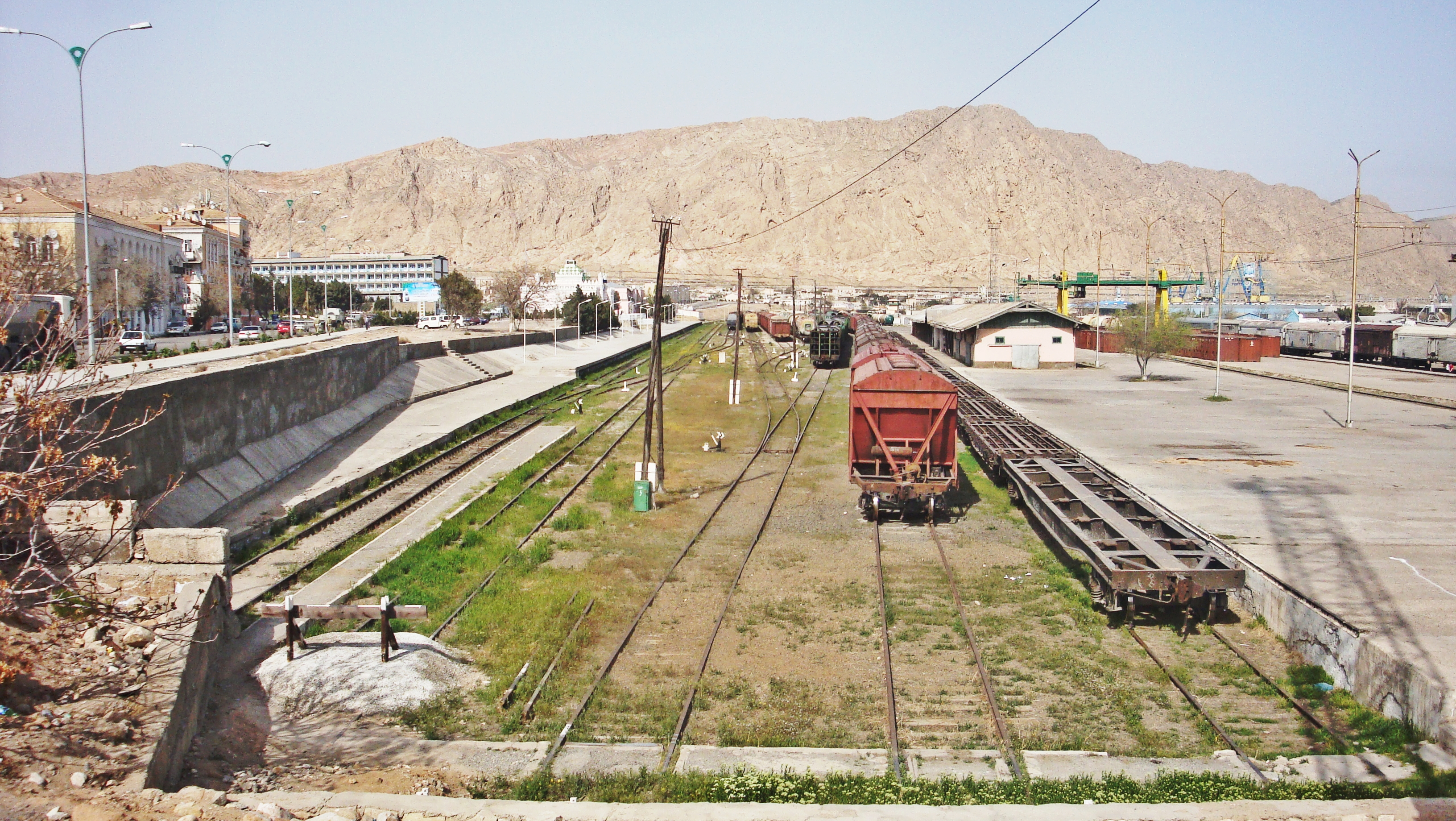 Железнодорожный вокзал города Туркменбаши - депо